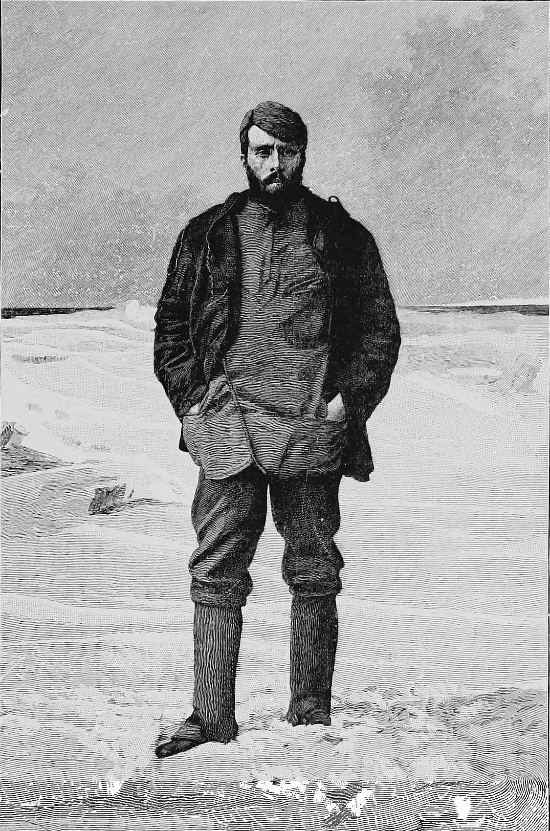 Норвежский полярник Отто Свердруп.